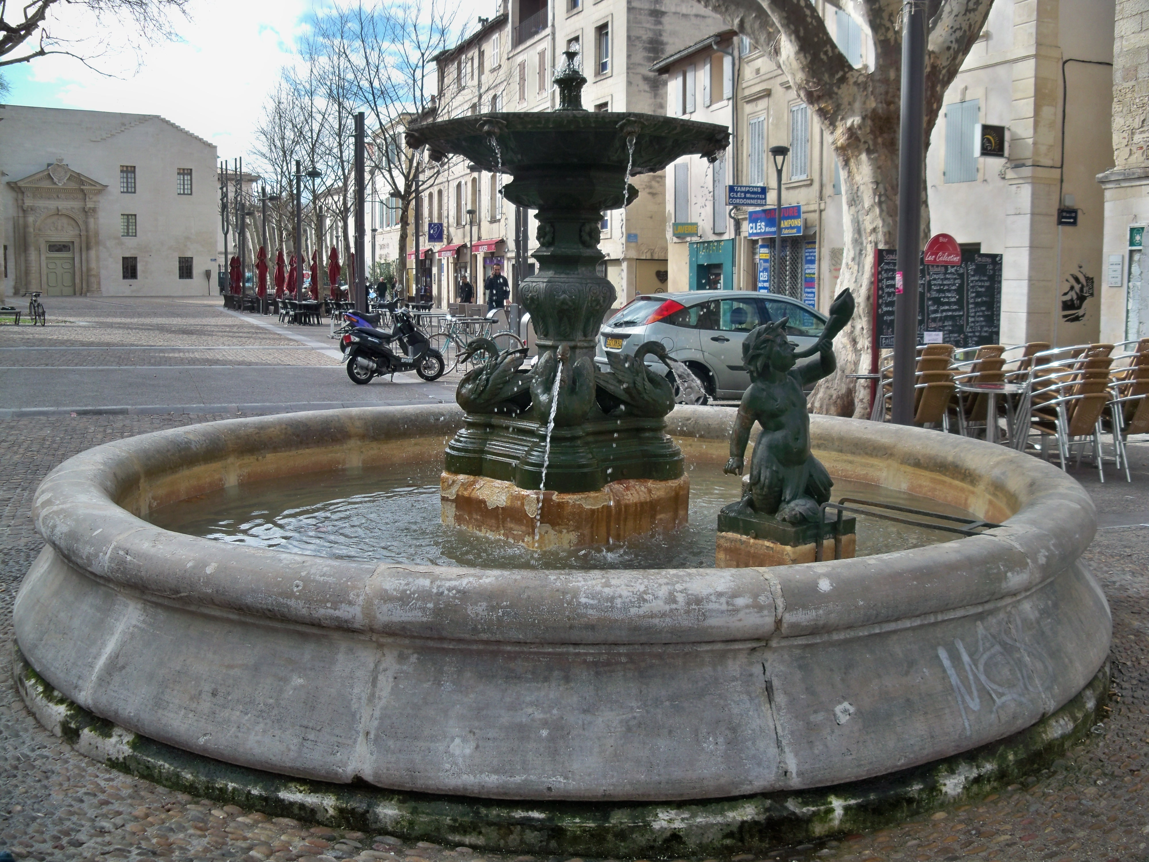 Fontaine de la place des Corps-Saints à Avgnon